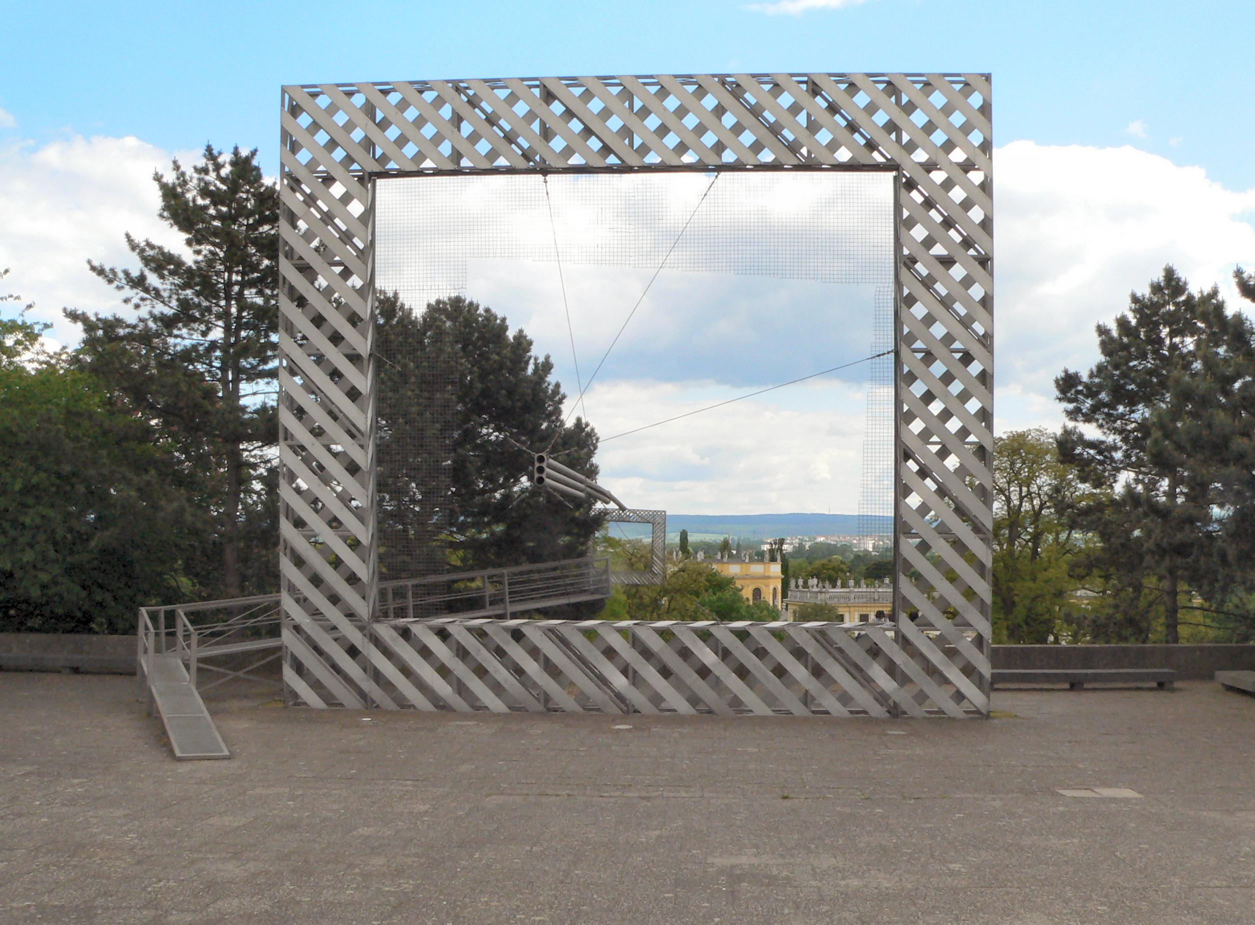 Rahmenbau, Werk des Künstlerkollektivs Haus Rucker & Co. für die documenta 6 in Kassel